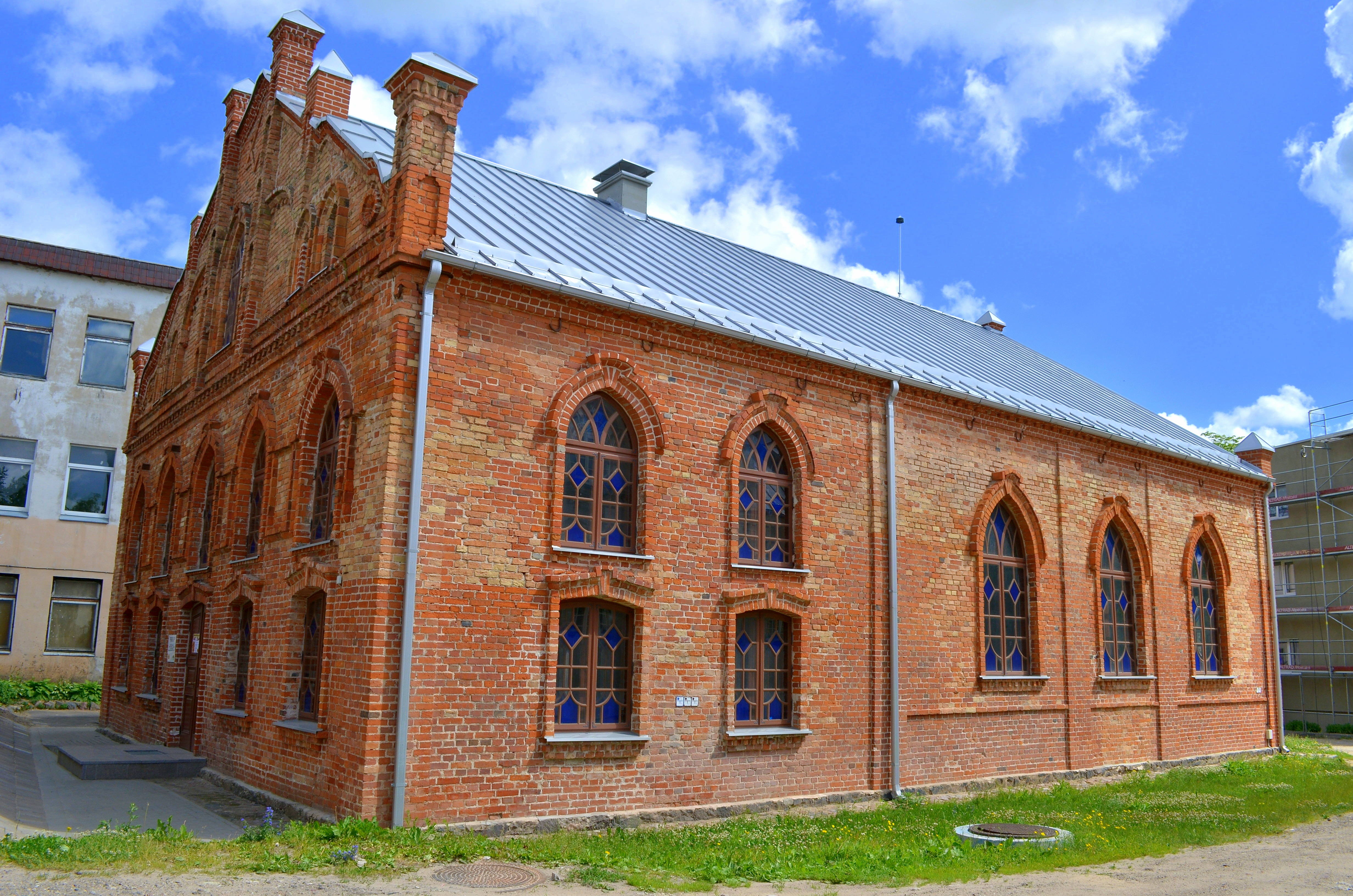 Raudonoji Joniškio sinagoga statyta 1865 m.